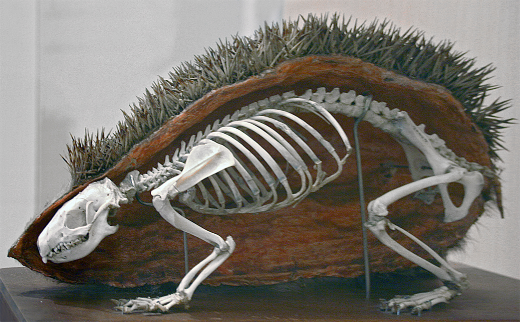 hedgehog